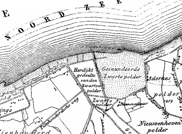 Zwarte polder